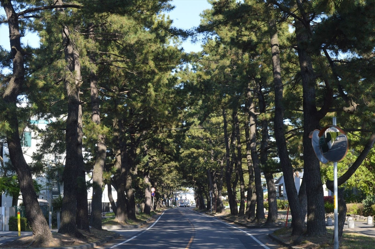 愛知県知立市の旧東海道松並木（知立松並木）。